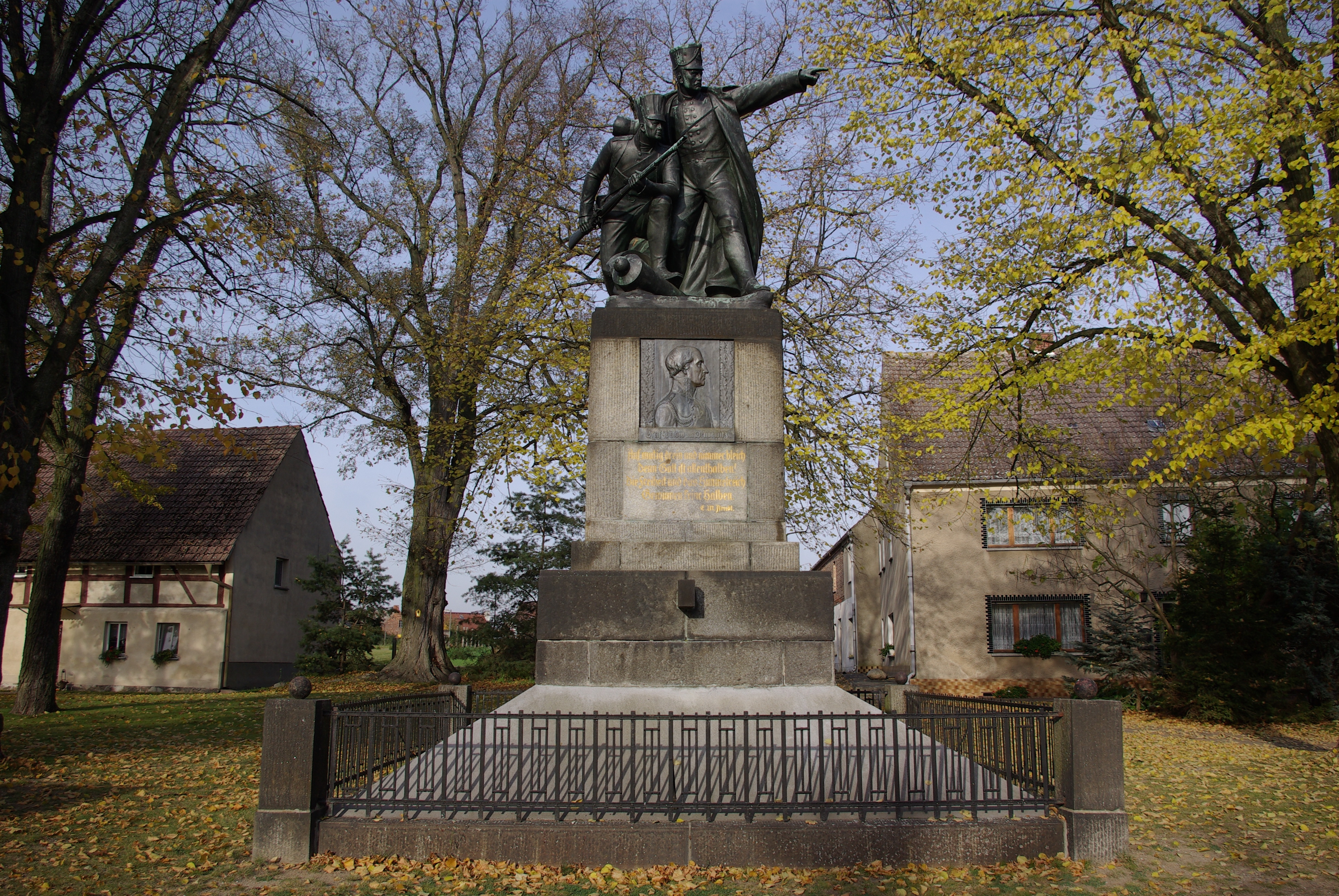 Bülowdenkmal in Niedergörsdorf-Dennewitz, Brandenburg, errichtet zur Erinnerung an die Schlacht bei Dennewitz am 6. September 1813, unter Denkmalschutz